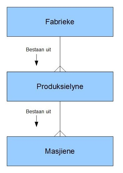 'n Eenvoudige entiteit-relasie (ER) datamodel met kraaivoet-notasie